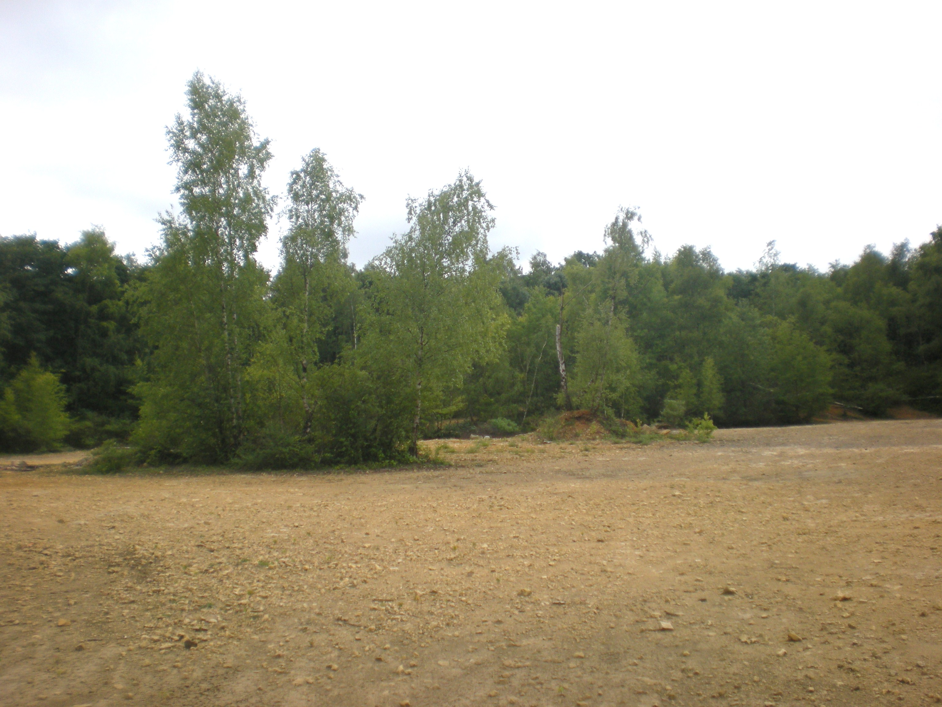 clairière dans le bois des côtes